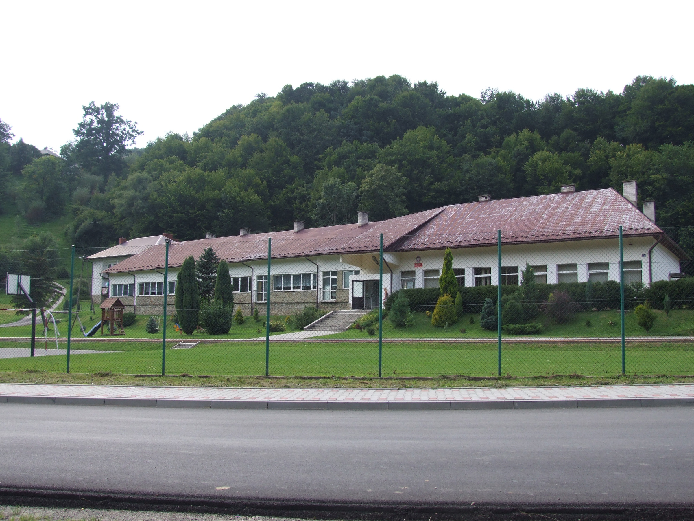 Kamionka Mała. Szkoła